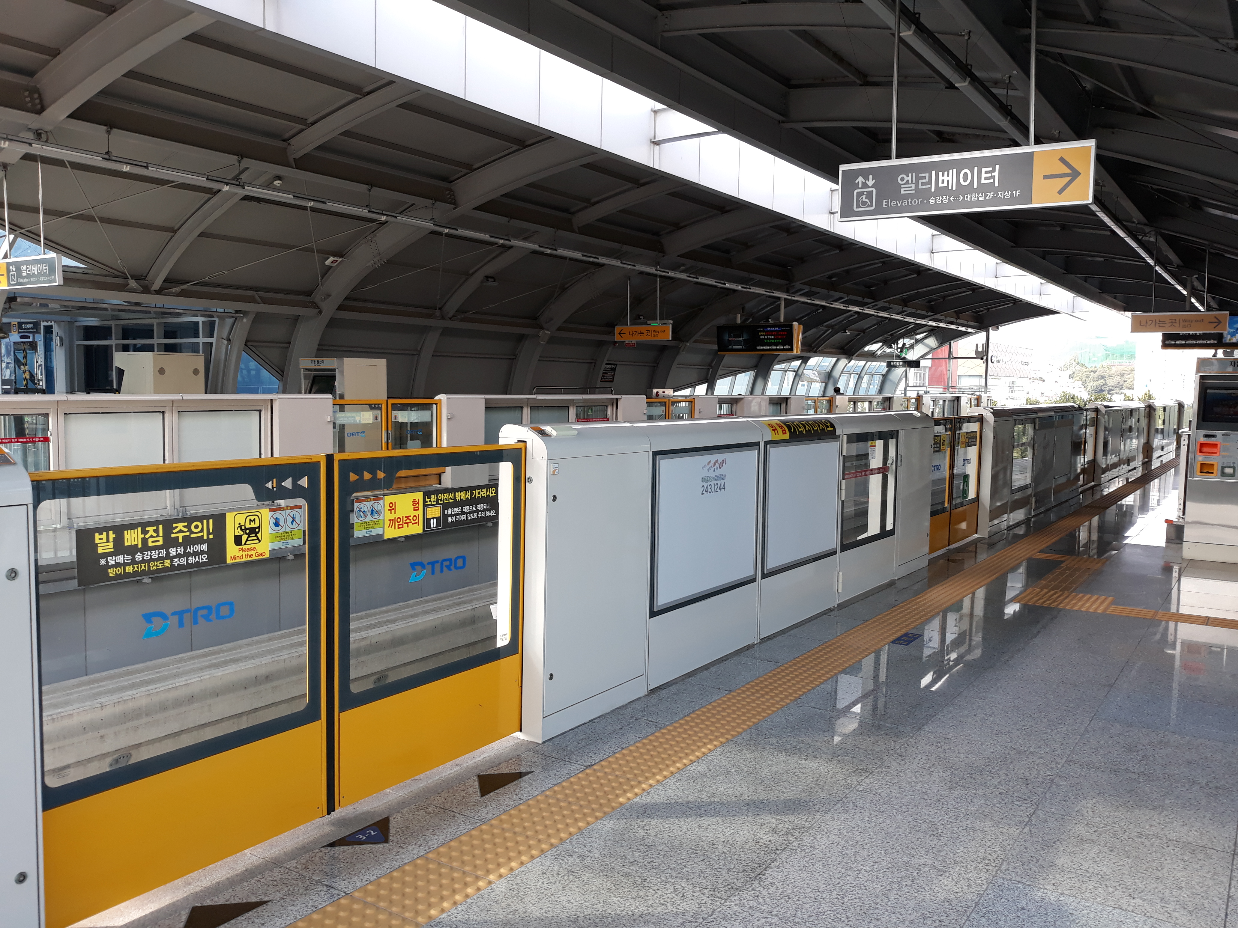 북구청역 승강장(칠곡경대병원 방면)